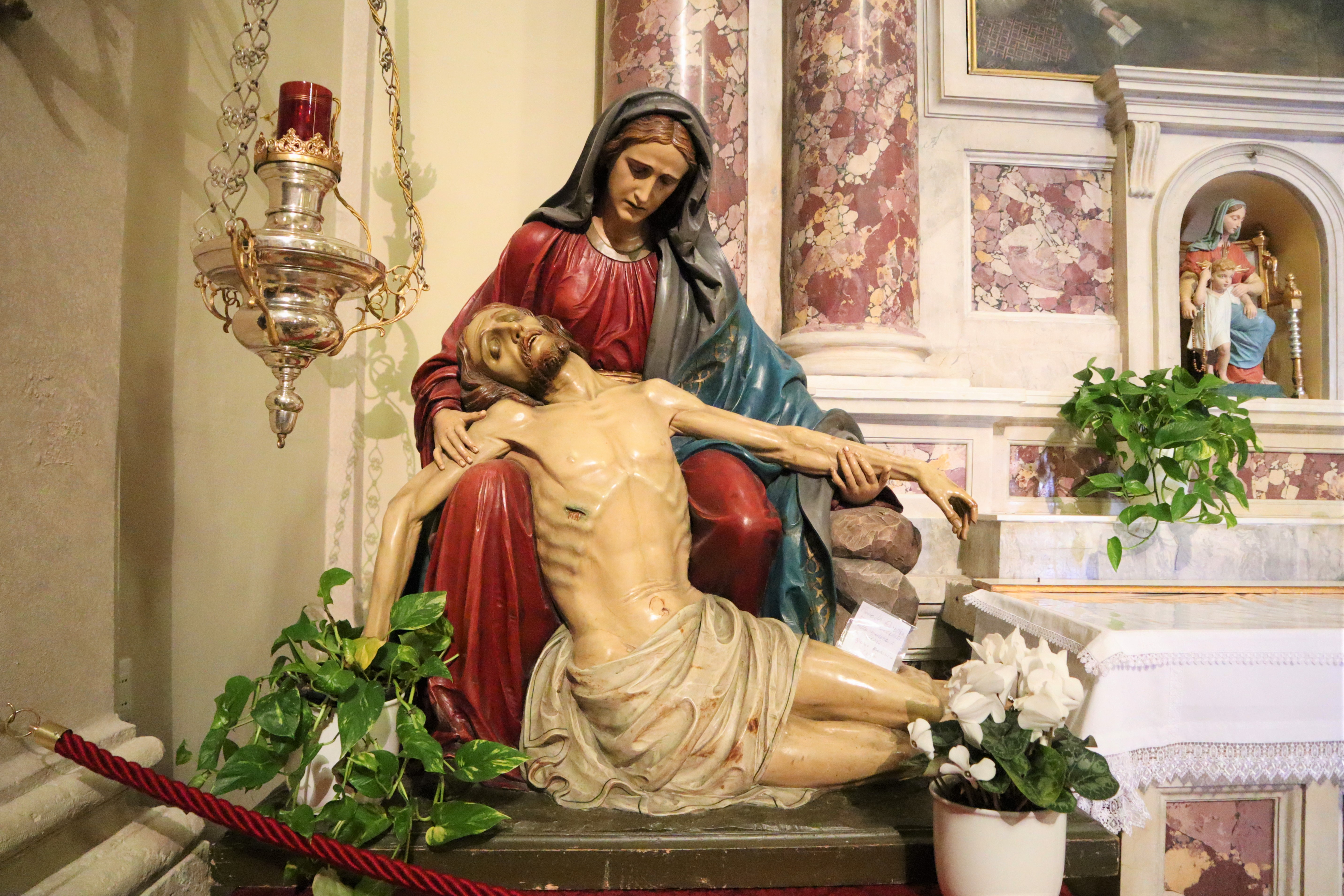 Chiesa di San Giovanni Battista. Interno.